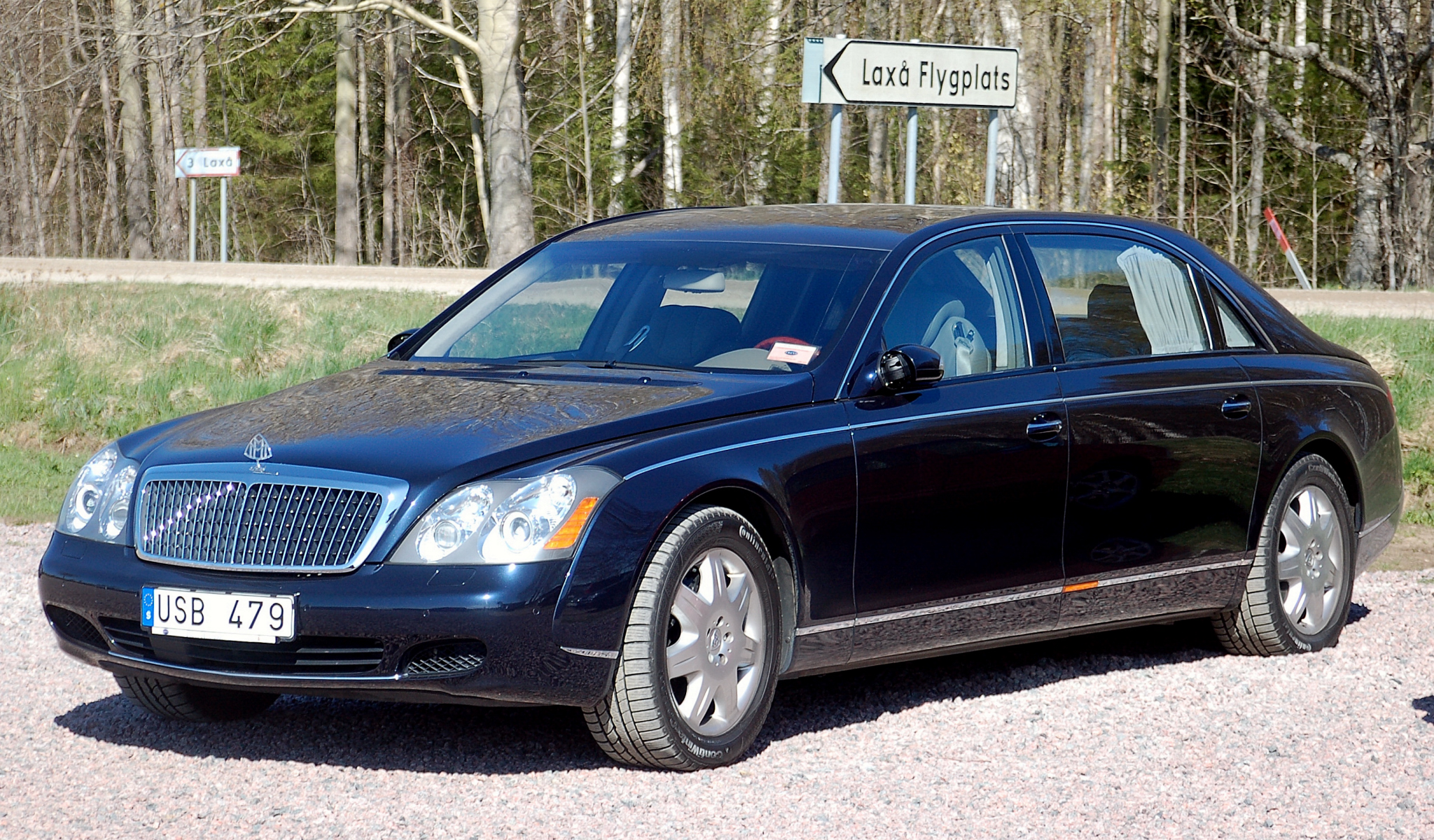 MAYBACH 62, 2004, Max hastighet, km/h: 250,0, Motoreffekt, kw: 405,0, Slagvolym, cm3: 5513, Växellåda: AUTOMAT